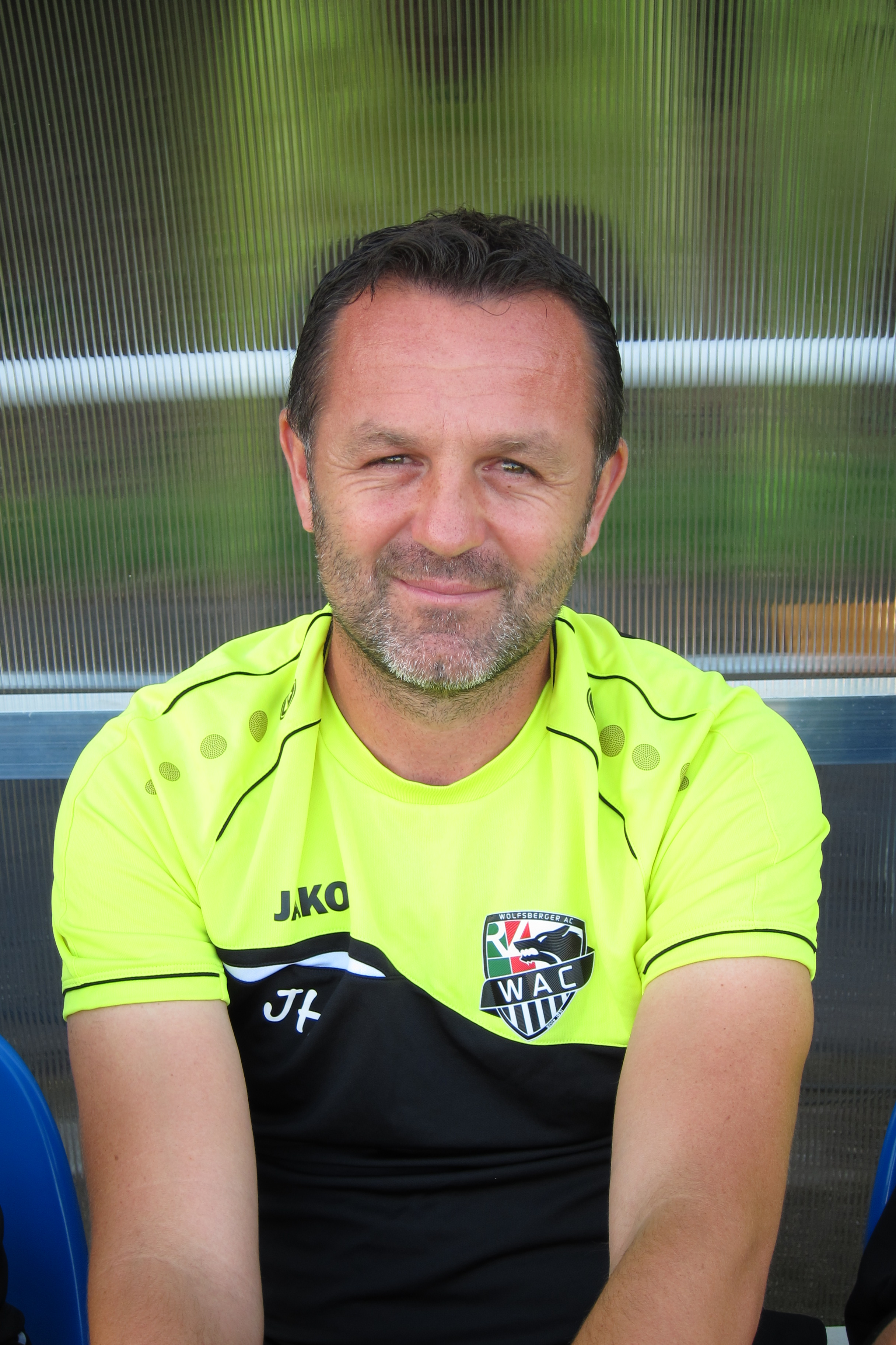 Hannes Jochum (WAC)